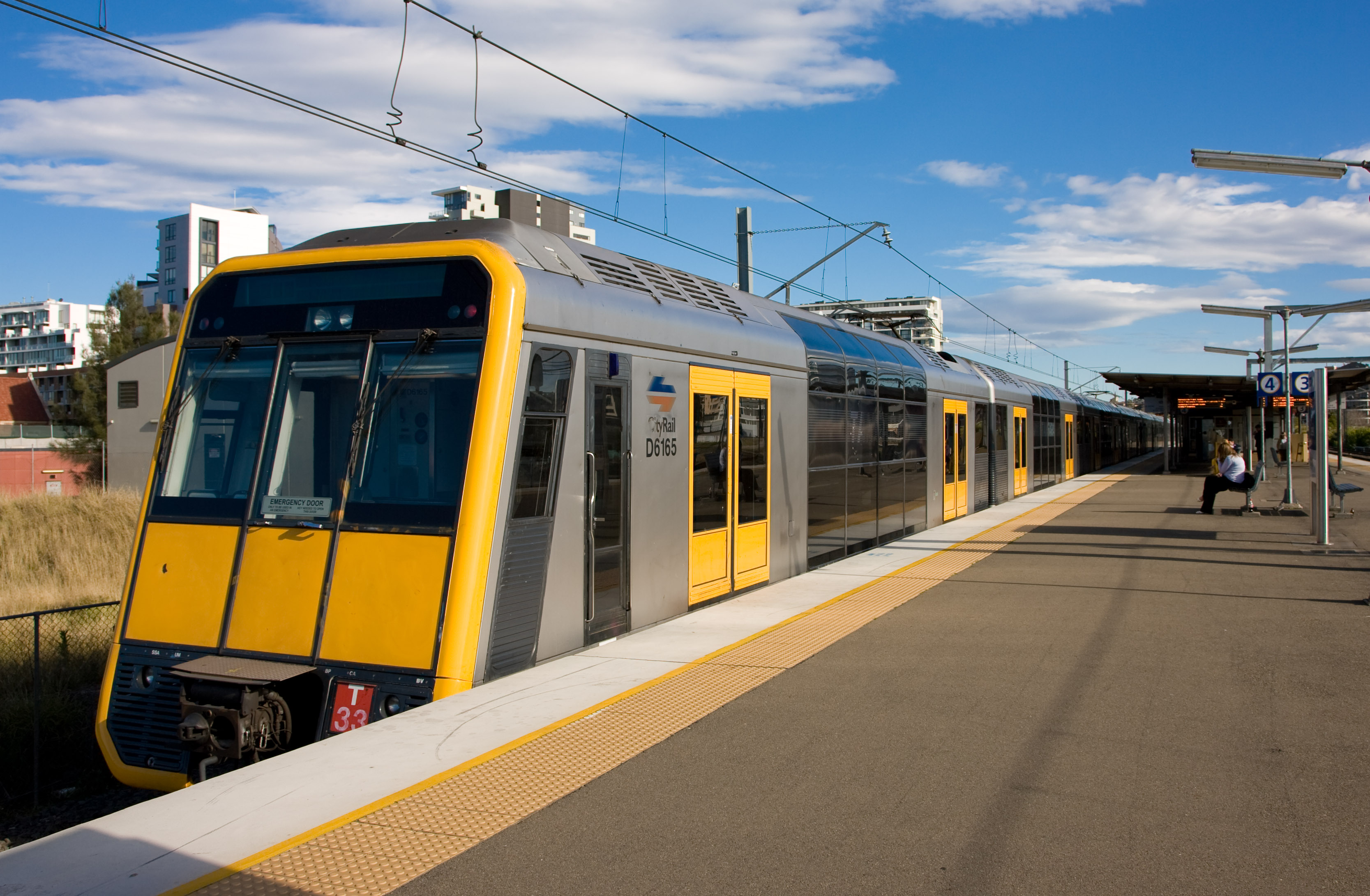 Tangara set 33 at Wolli Creek.